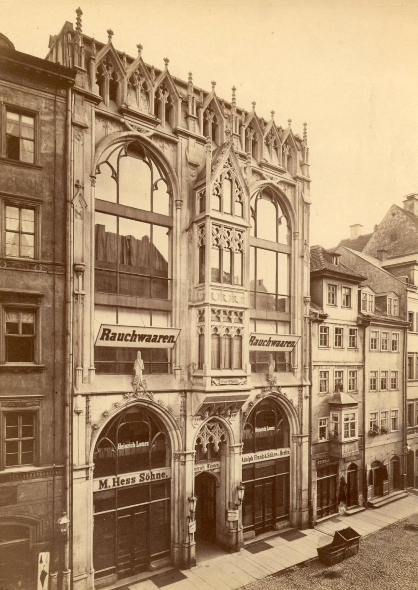 Das Lomersche Haus des Pelzhändlers Lomer am Brühl in Leipzig, in dem sich die Gaststätte „Gute Quelle“ befand. Hausinschrift: Gute Quelle Heinrich Lomer Rauchwaaren M. Hess Söhne Adolph Frank & Söhne, Berlin